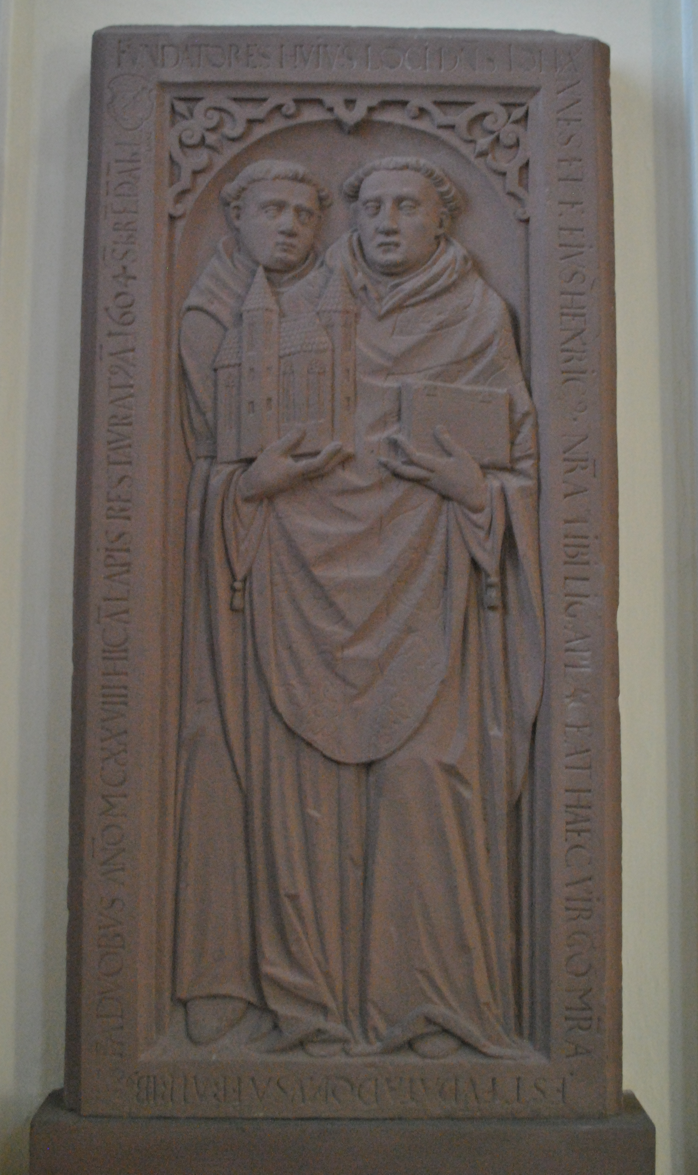 Katholische Klosterkirche Sankt Michael, dreischiffige Säulenbasilika mit Ostquerschiff und zwei Chortürmen mit Welschen Hauben sowie Westvorhalle, im Kern 2.Hälfte 12. Jahrhundert, Einwölbung 1. H. 17. Jahrhundert, Fassade im römischen Barock 1696, Chor und Chortürme nach Abbruch (1838) 1901 wiedererrichtet, mit Ausstattung, Stifterepitaph Domherr Johannes, Bruder Heinrich D-6-79-209-55